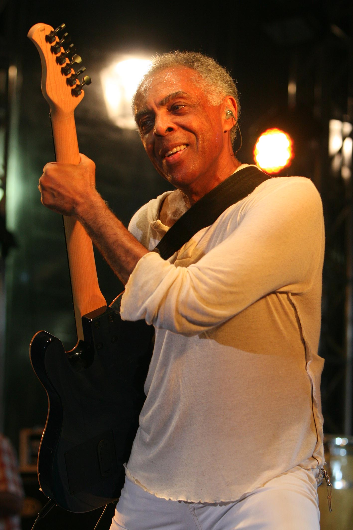 Abertura do São João 2011 no Pelourinho, com concurso de quadrilhas juninas, shows de Gilberto Gil e Targino Gondin. Na foto: Gilberto Gil.